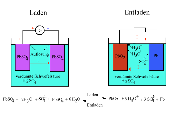 Schema eines Bleiakkumulators